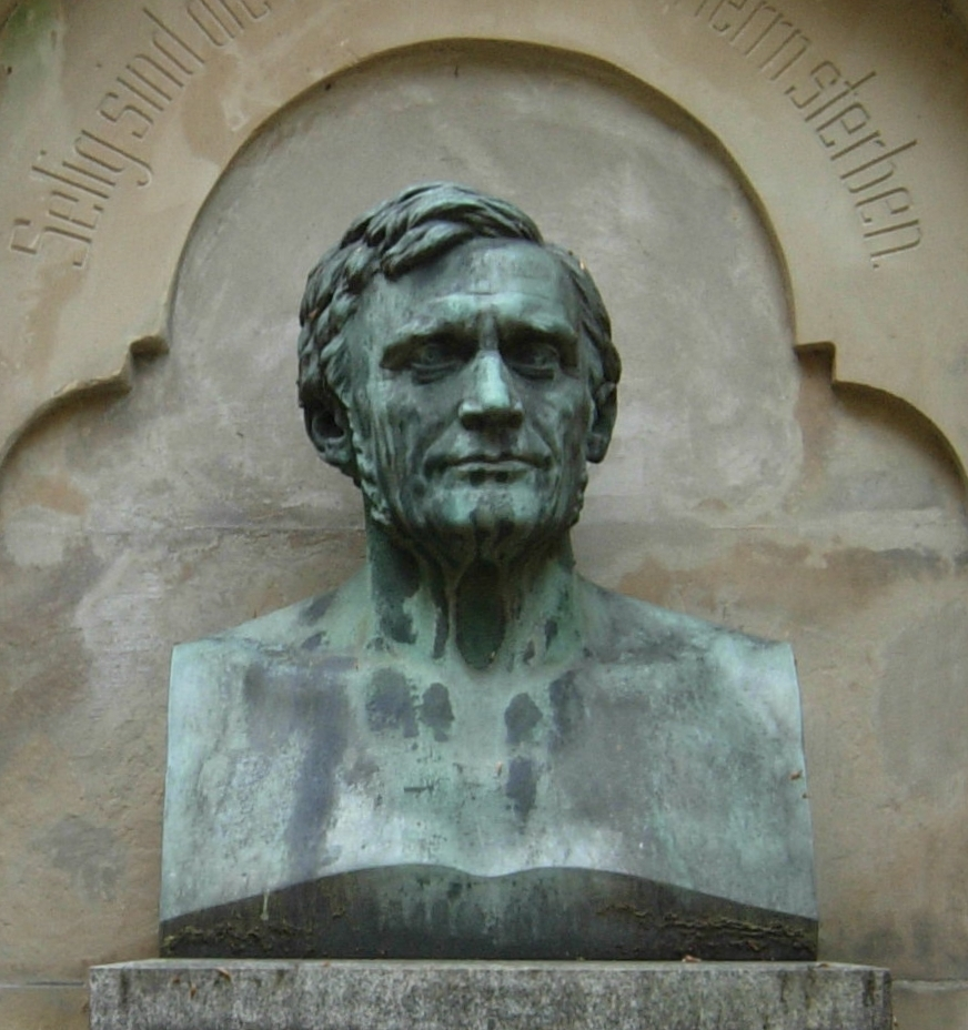 Albert Küppers: Bronze-Büste des Chirurgen Wilhelm Busch (* 5. Januar 1826 in Marburg, † 24. November 1881 in Bonn) auf dem